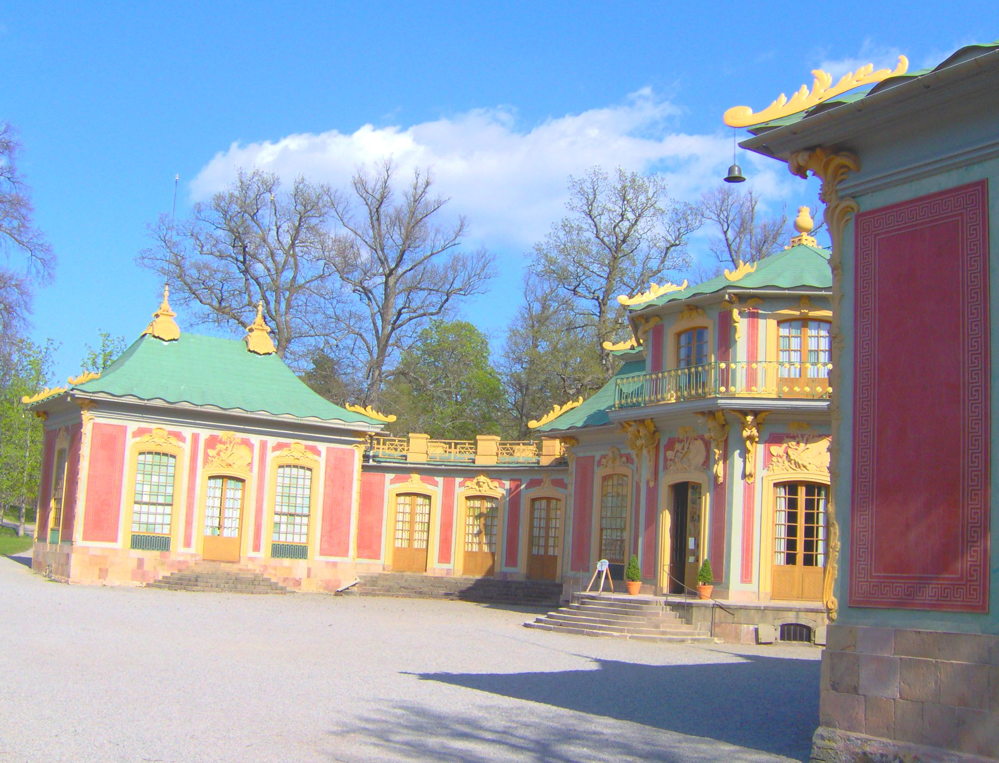 Kina lustslott, Drottningholms slott i Stockholm. 2006.